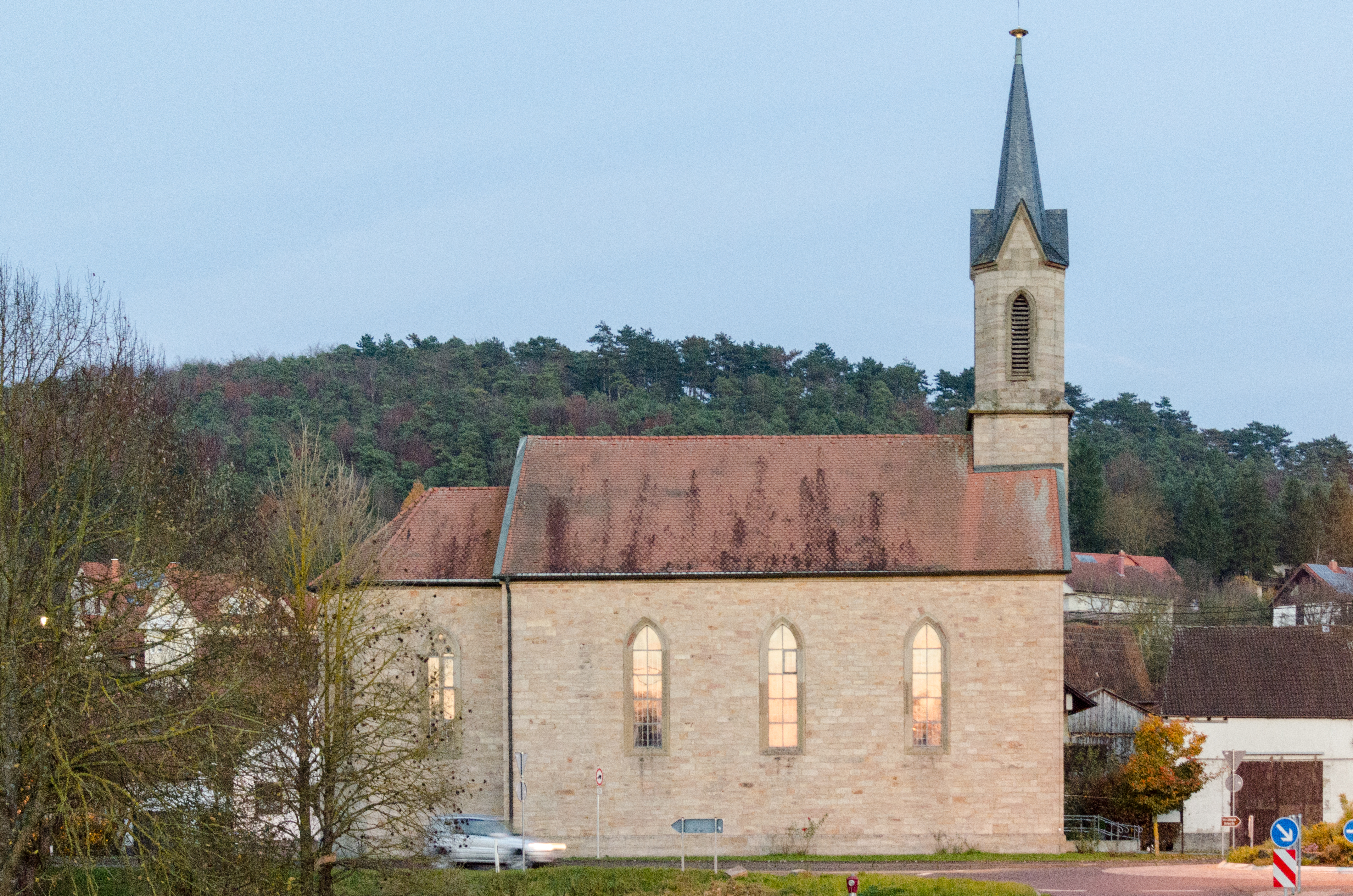 Münnerstadt, Burghausen, Kath. Kirche